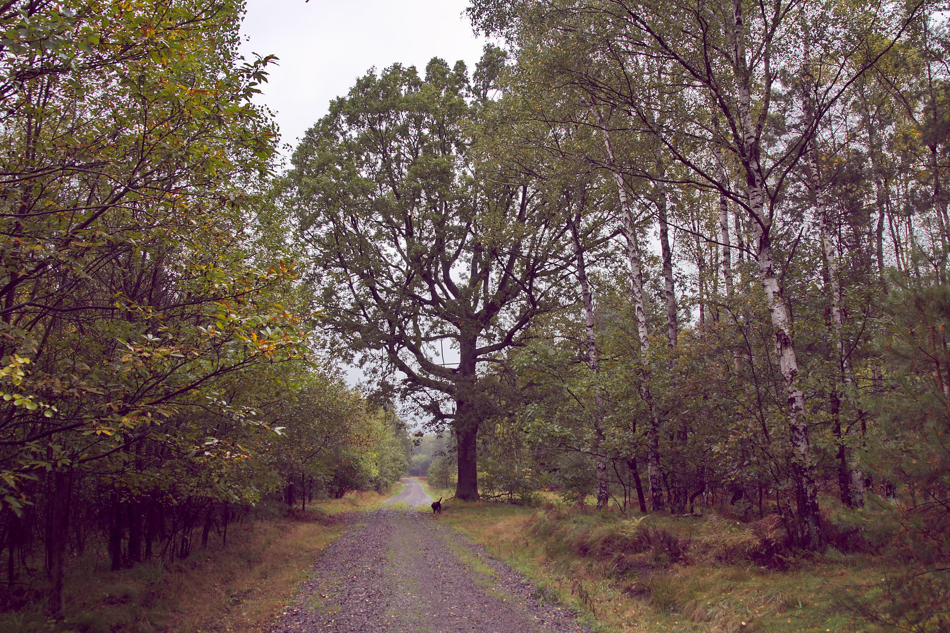 Sodeiche (Brunneneiche) im Forst Rundshorn (Wedemark), Niedersachsen, Deutschland soll einen Gerichtsplatz von 1354 markieren